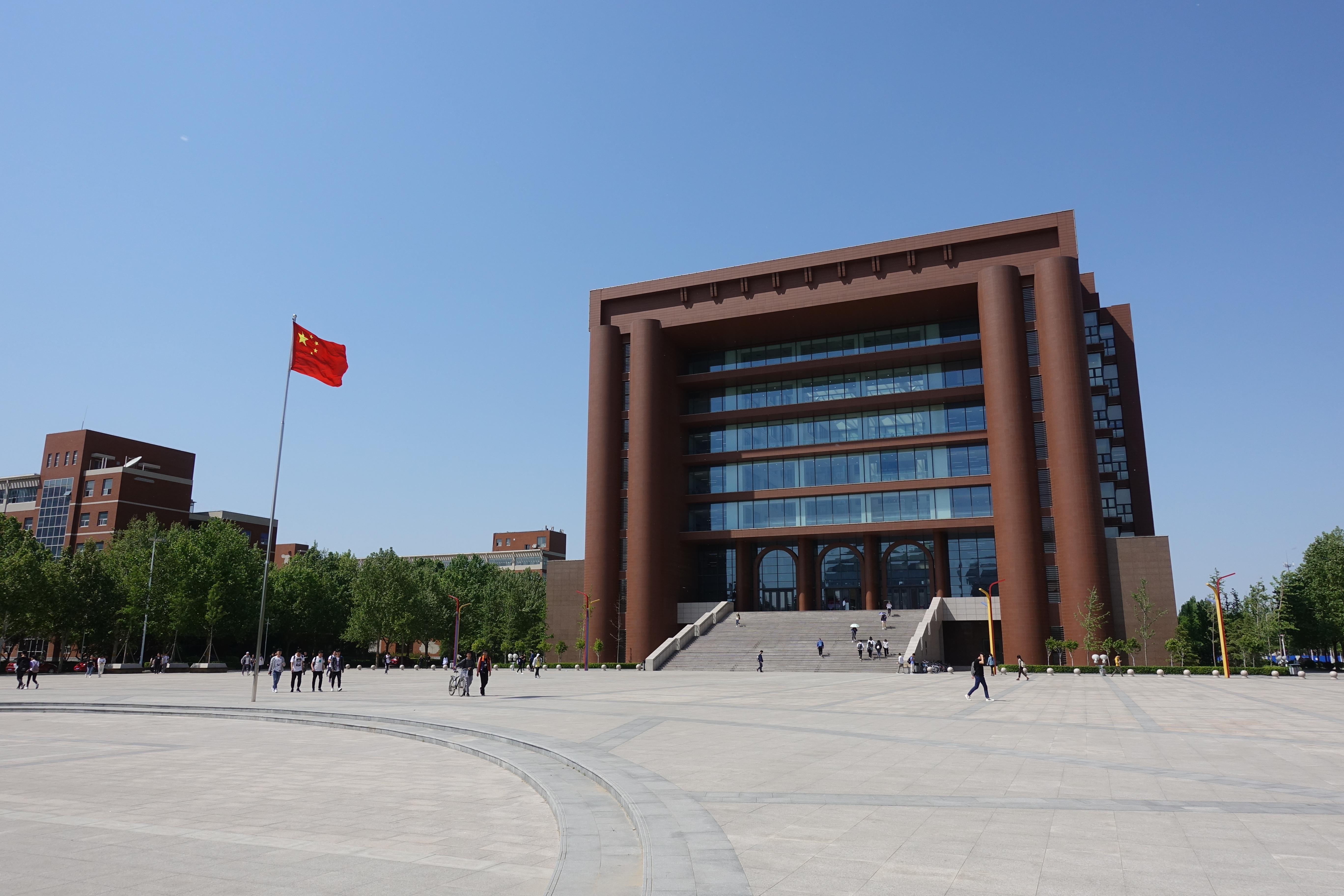 河北大学新区图书馆，河北省保定市莲池区。